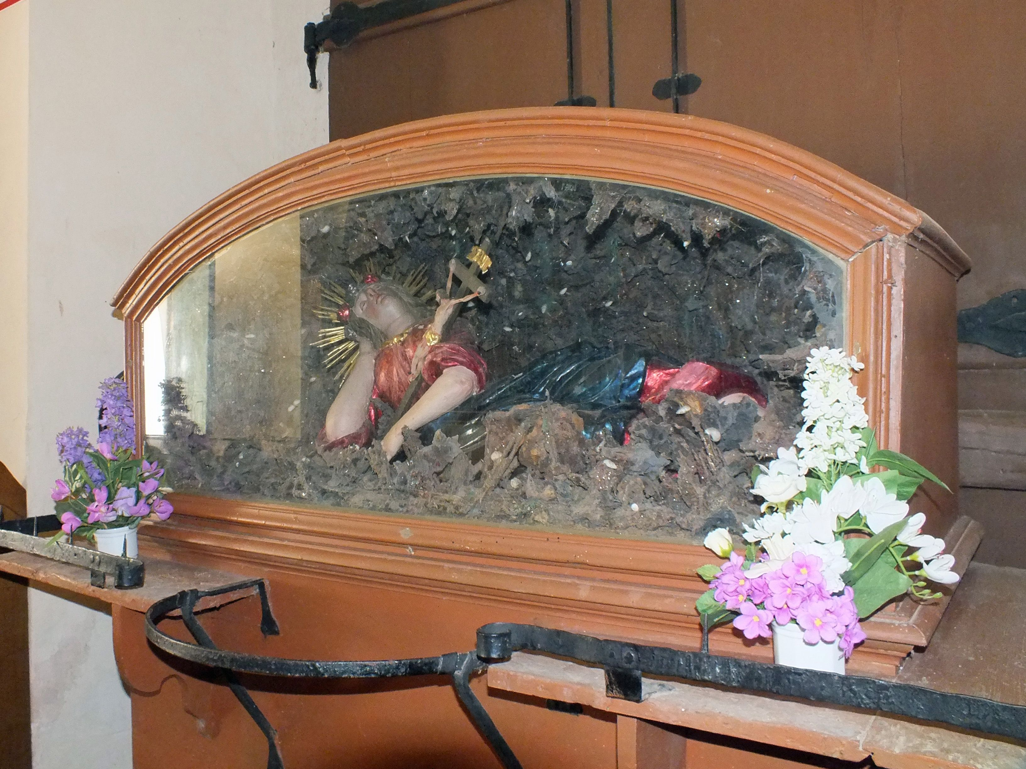 Rosalienkapelle Forchtenstein, Rosalienschrein